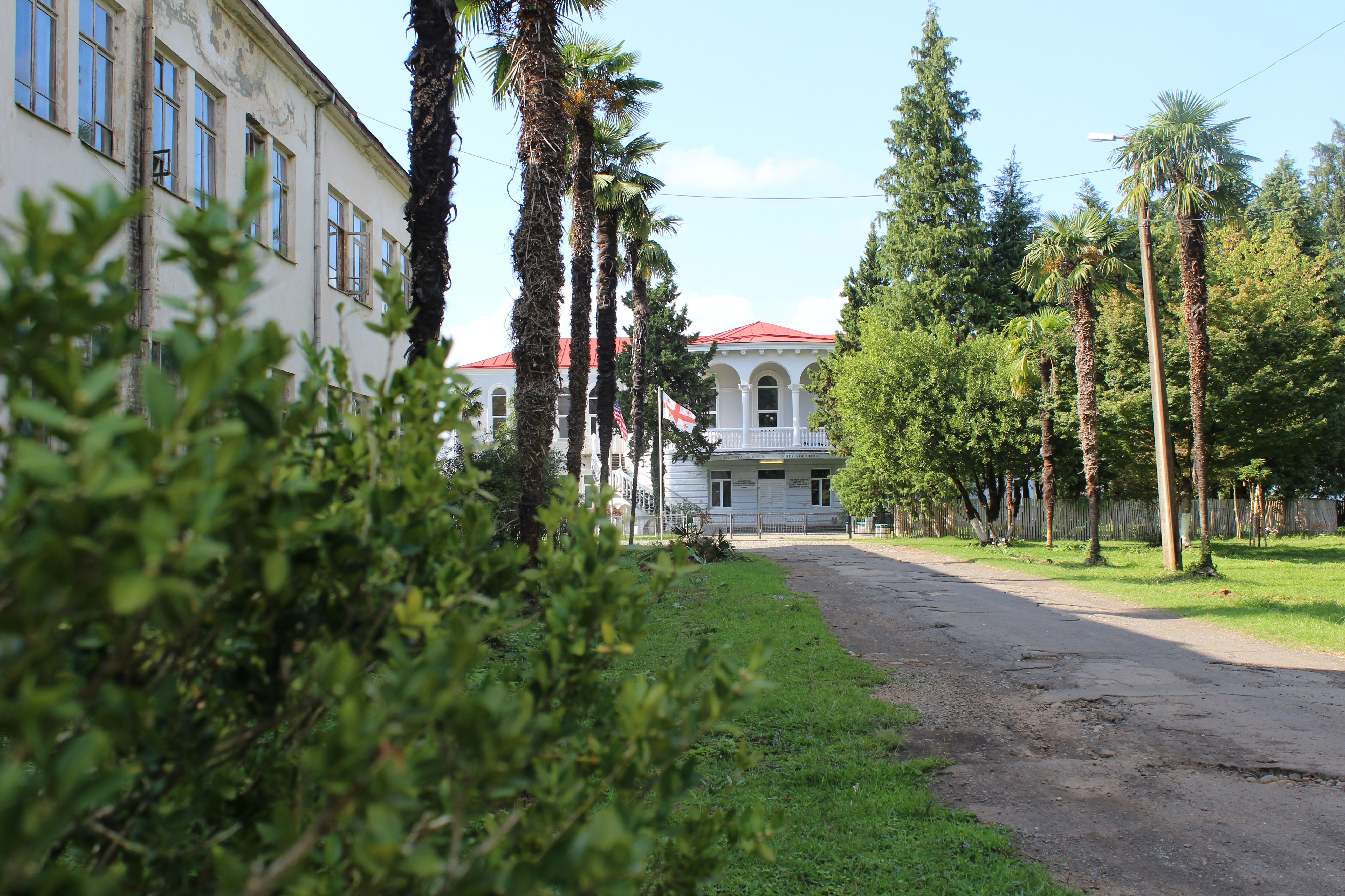 აგრარული უნივერსიტეტის დასავლეთ საქართველოს კამპუსი